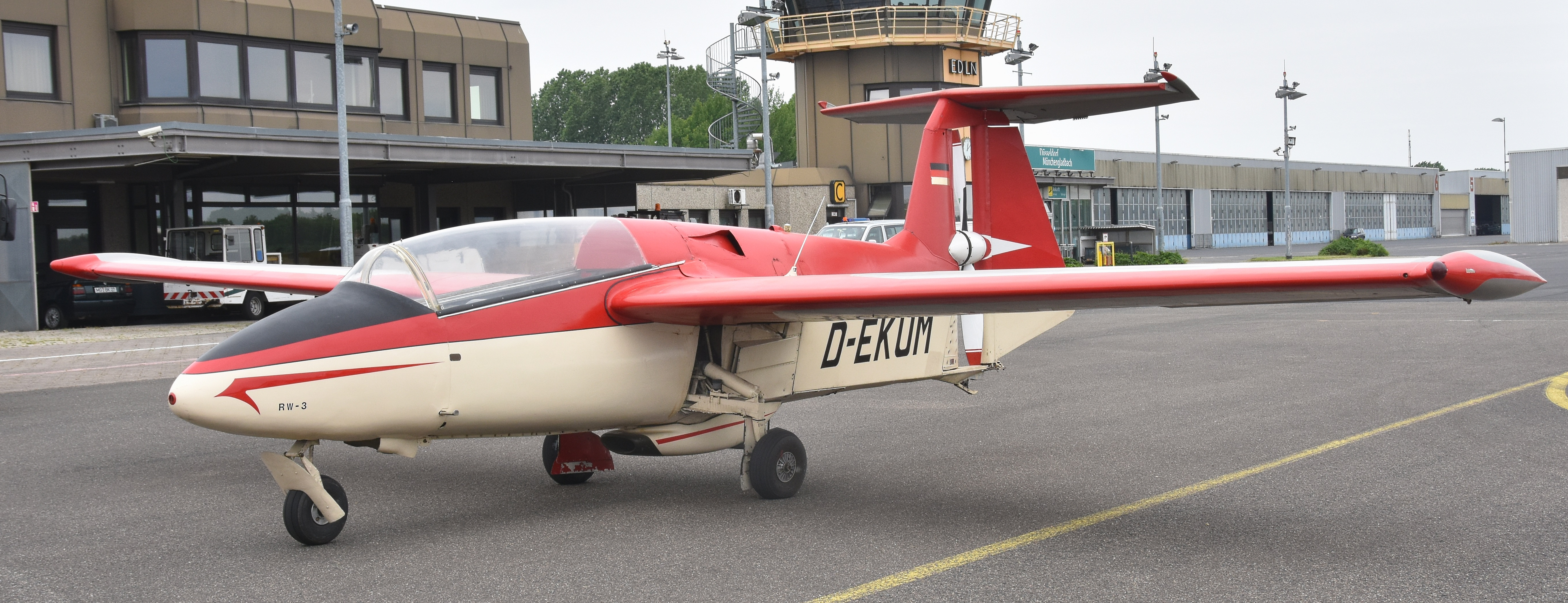 Rhein-Westflug Fischer RWF (RFB) RW-3, 2. Prototyp D-EKUM, beim 'Oldtimer FLY & DRIVE IN Mai 2019' Mönchengladbach Flughafen (MGL) - Hugo Junkers Hangar